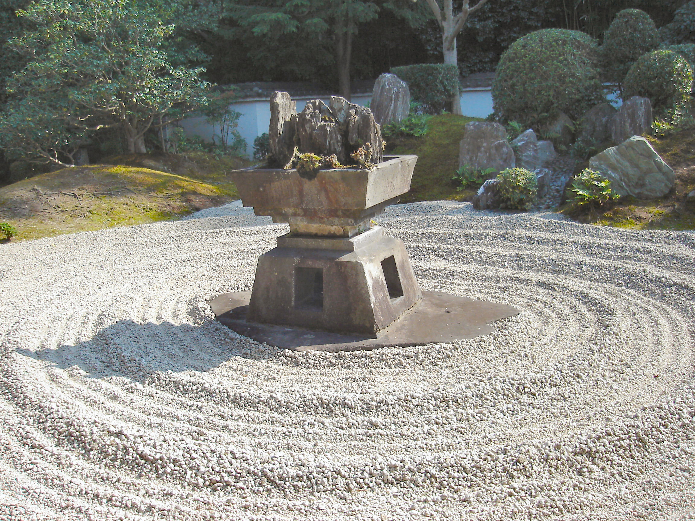 Tofukuji Reiunin Iai-seki (東福寺霊雲院の遺愛石)